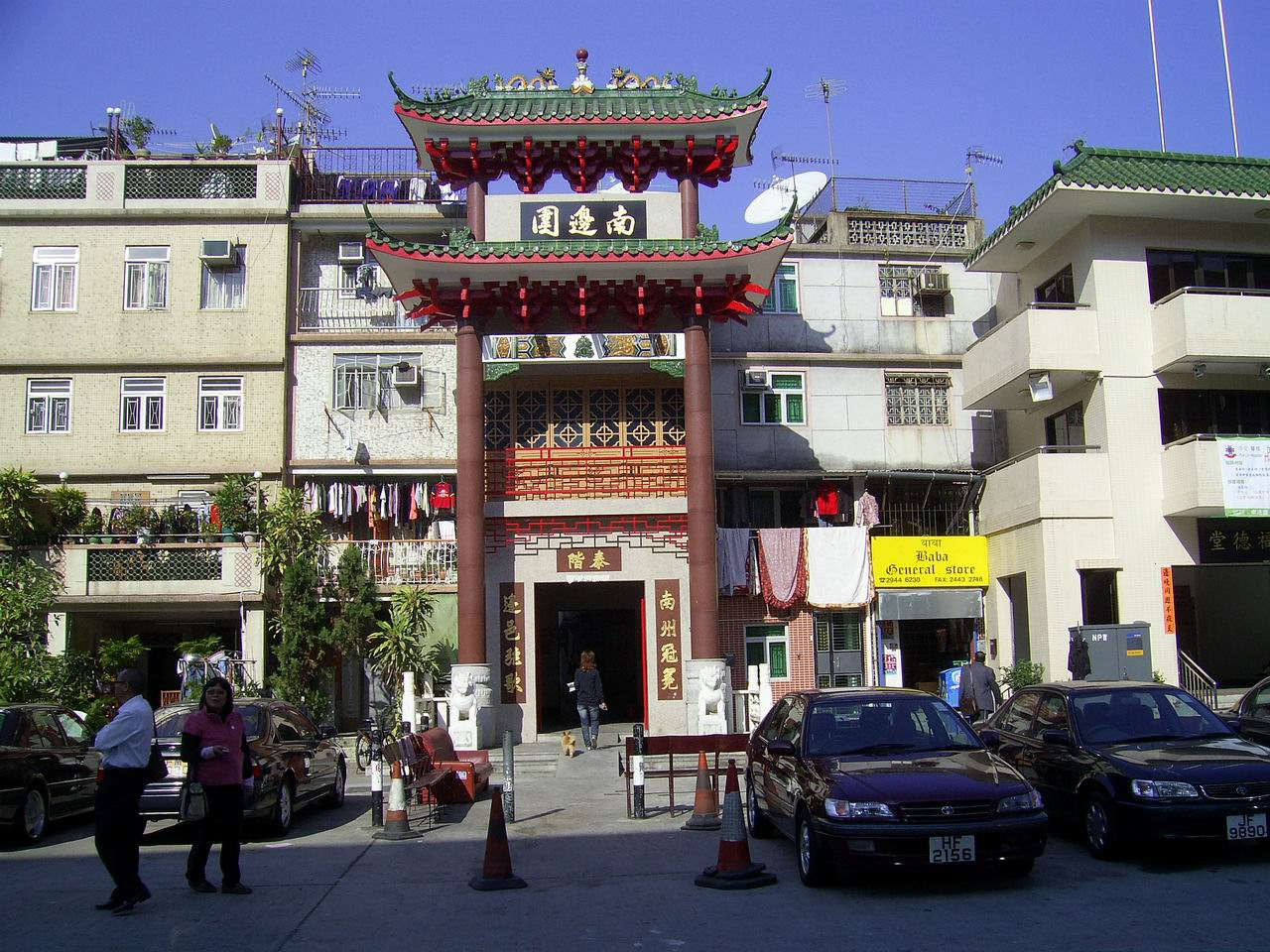 中文（香港）: 南邊圍門樓